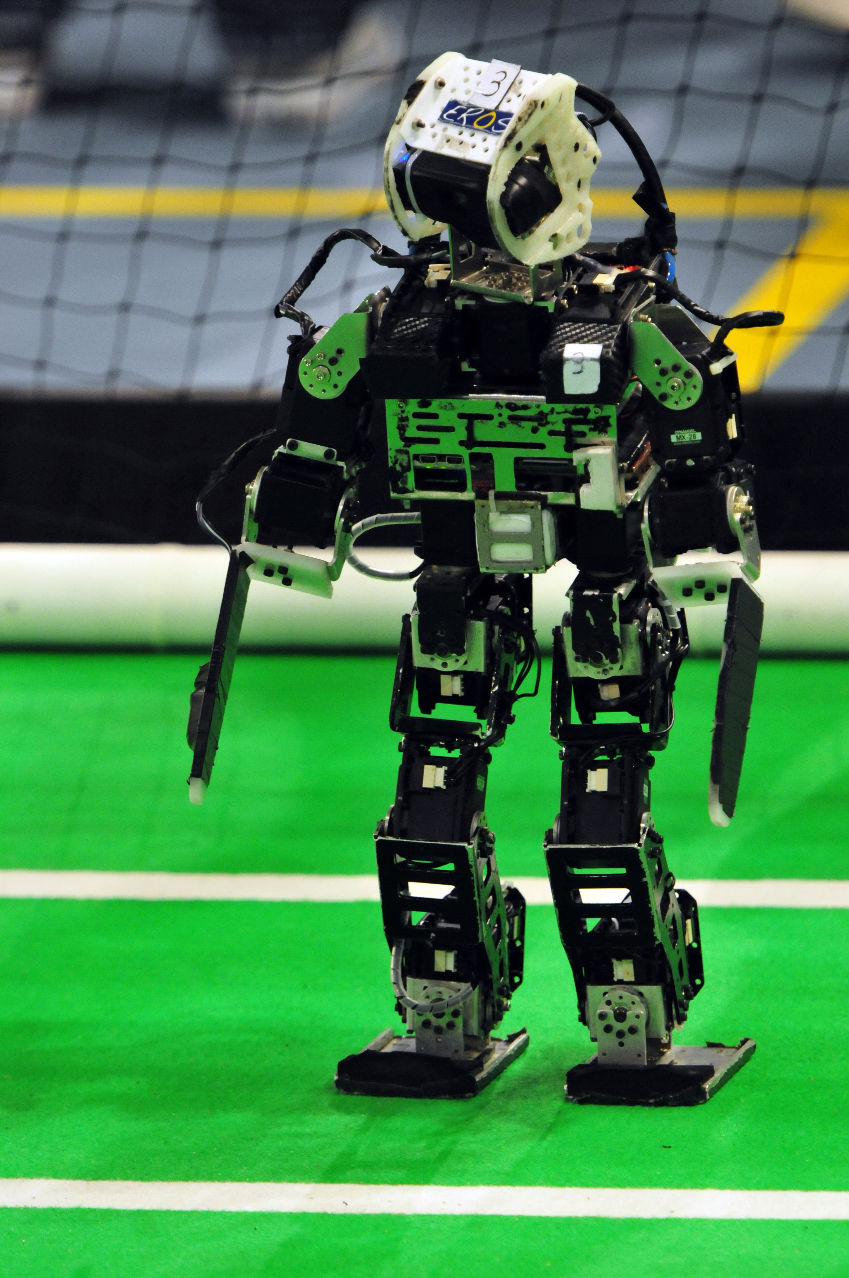 Eindhoven, Niederlande, Robocup 2013